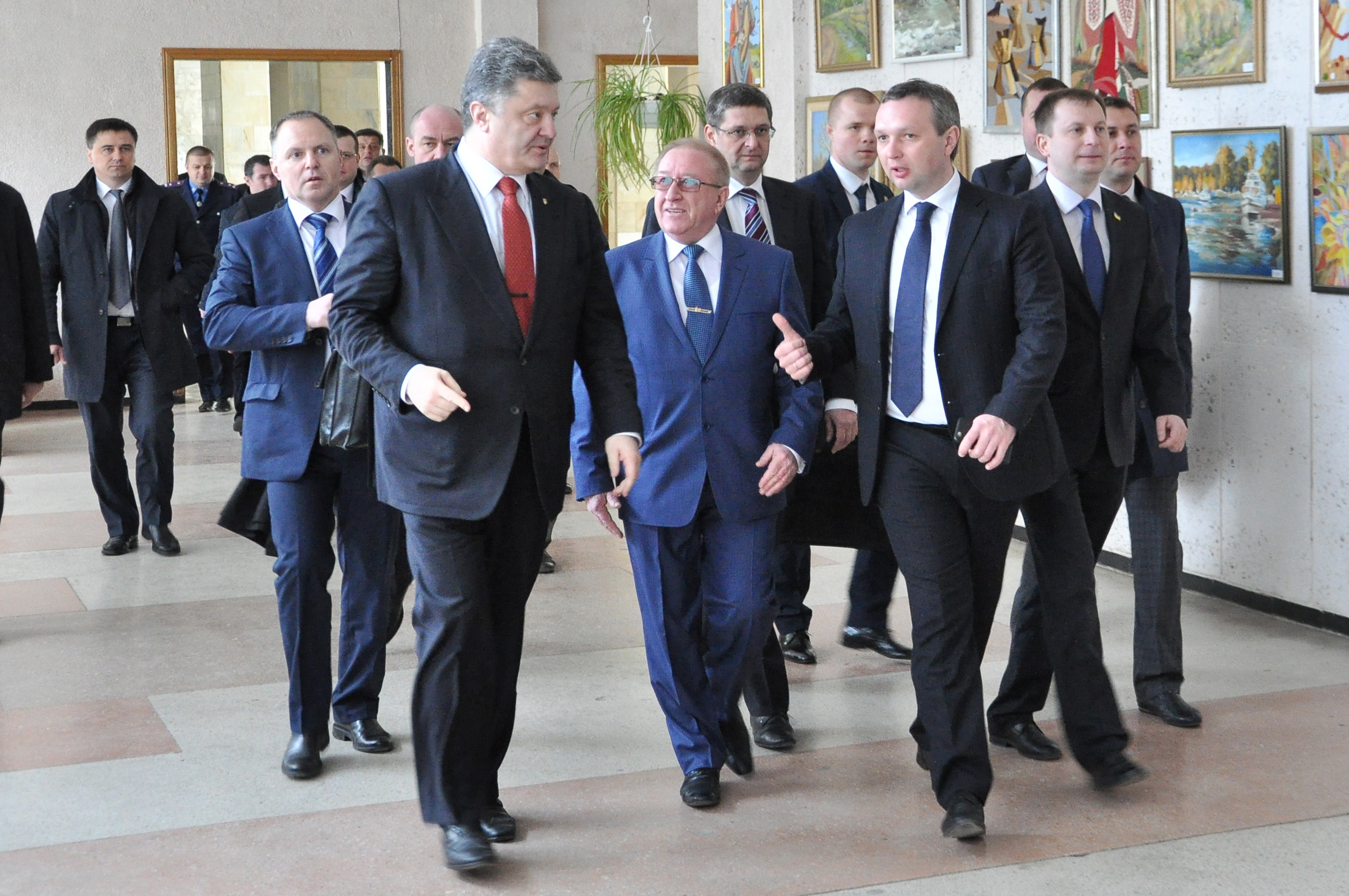 Президент України Петро Порошенко під час візиту до Тернополя 2 квітня 2015 року. Зустріч зі студентами в Тернопільському національному педагогічному університеті. Поряд з Президентом — ректор ТНПУ Володимир Кравець.